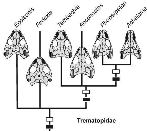 Trematopidae skulls